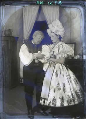 Babay József: Napraforgó. Nemzeti Színház. Bemutató: 1935-12-14. Rendező: Kiss Ferenc (játékmester). Beleznai István: Gózon Gyula, Kisasszondi Katalin: Somogyi Erzsi.